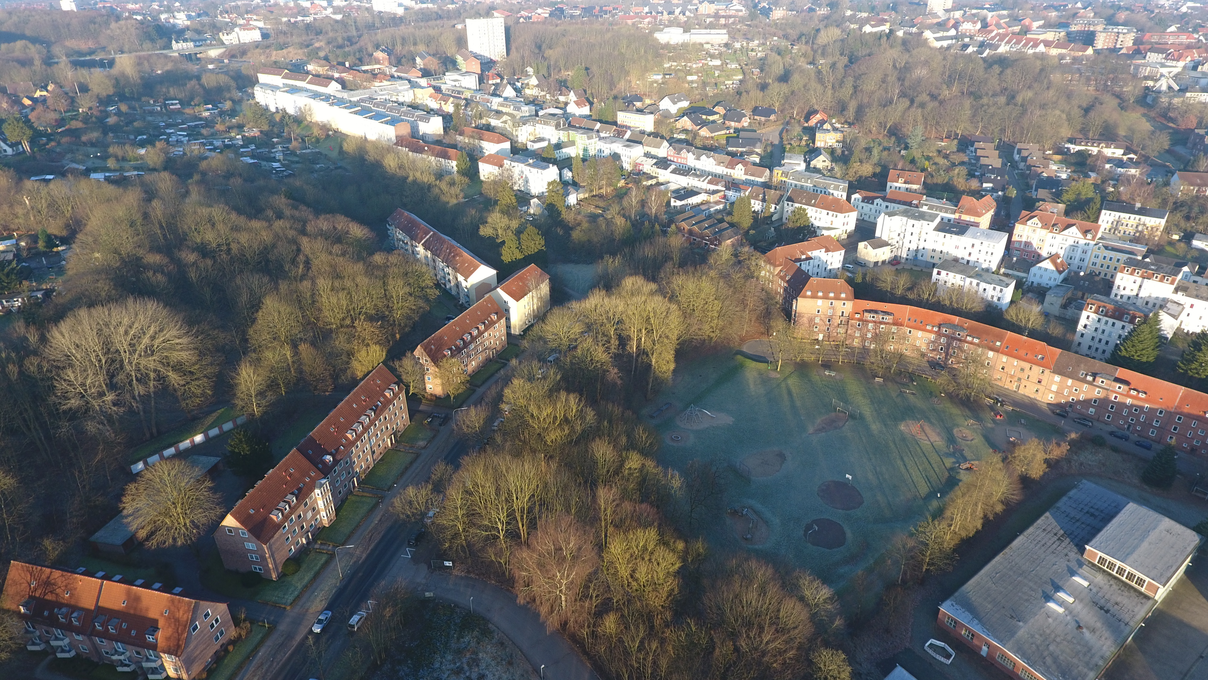 Blick auf die alte Panzerkaserne in der Flensburger Neustadt